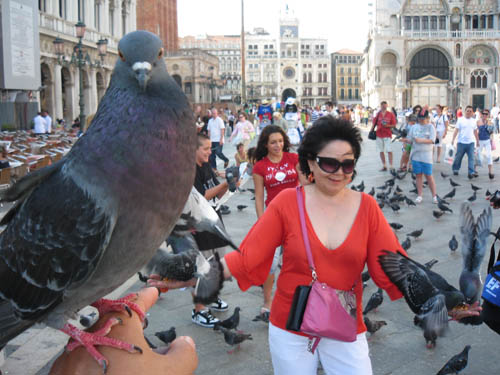 Голуби площади святого Марка в Венеции